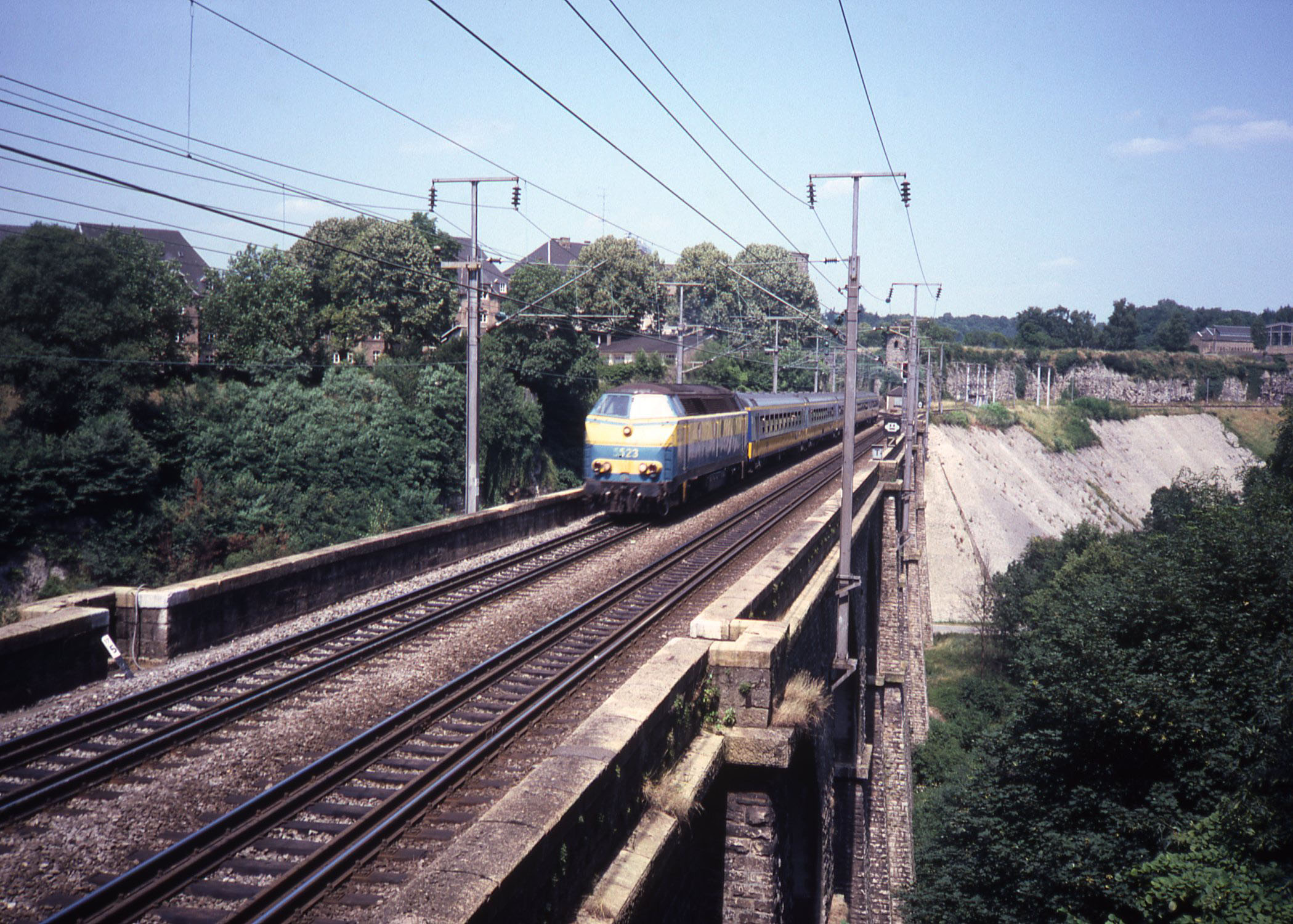 Nederlandse IC rijtuigen getrokken door een Belgische locomotief komen aan in Luxemburg stad. De lijn was nog niet geëlektrificeerd en in de zomer reden er nog doorgaande Nederlandse rijtuigen mee als toeristentrein in het weekend. Ook de brug is ondertussen verbouwd en verbreed.